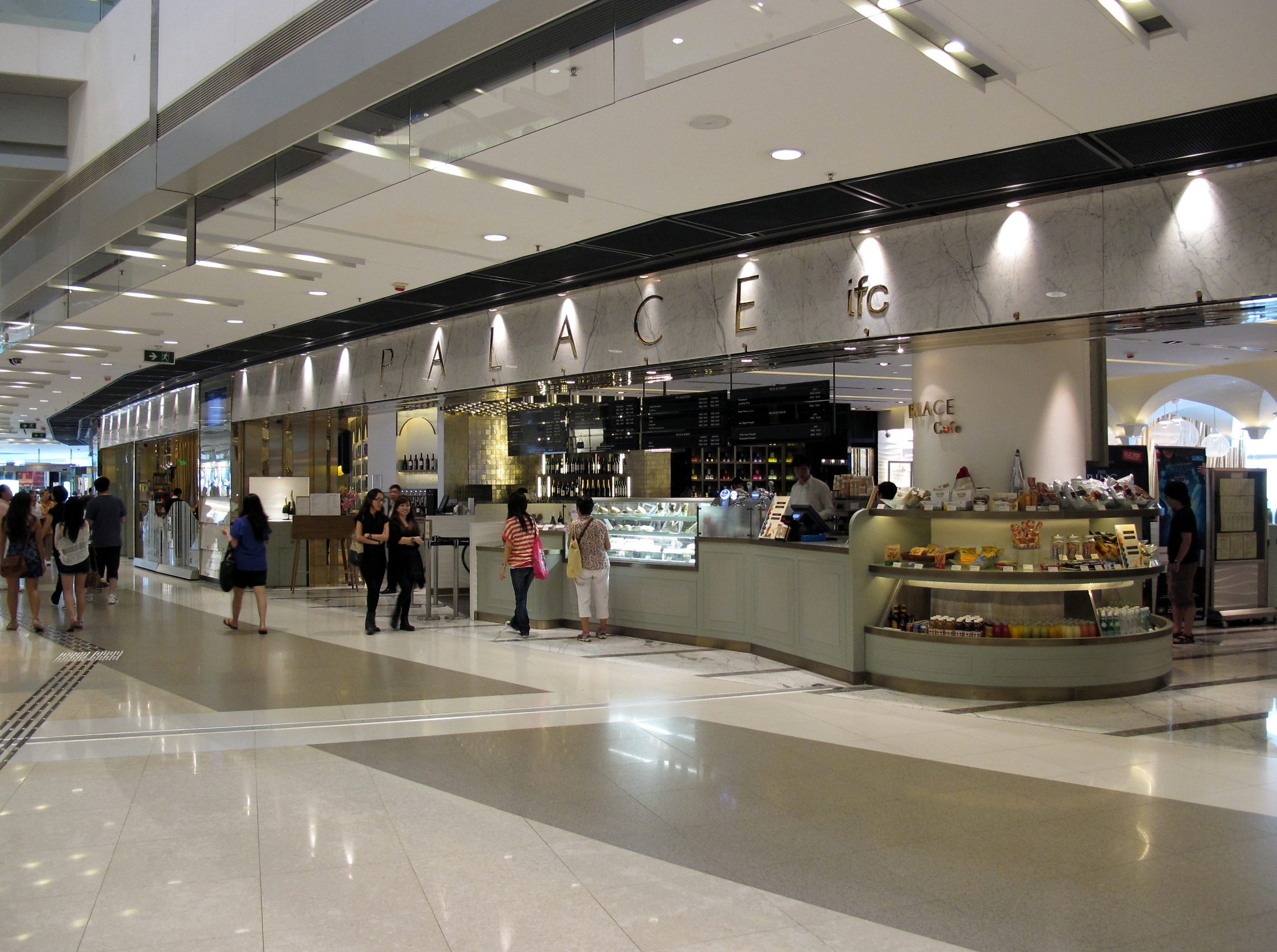 國際金融中心Palace IFC